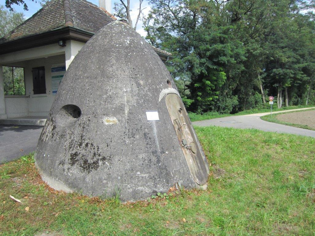 Infanteriebunker A 4302 Steg beim Zollhaus Schwaderloch